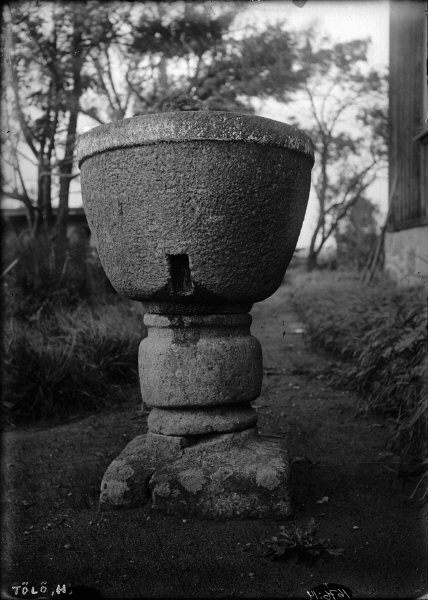 Dopfunt av täljsten, 1200-tal. Snabbinv. Kategori: (04) Dopfuntar Dopfunt av täljsten, 1200-tal. Snabbinv.